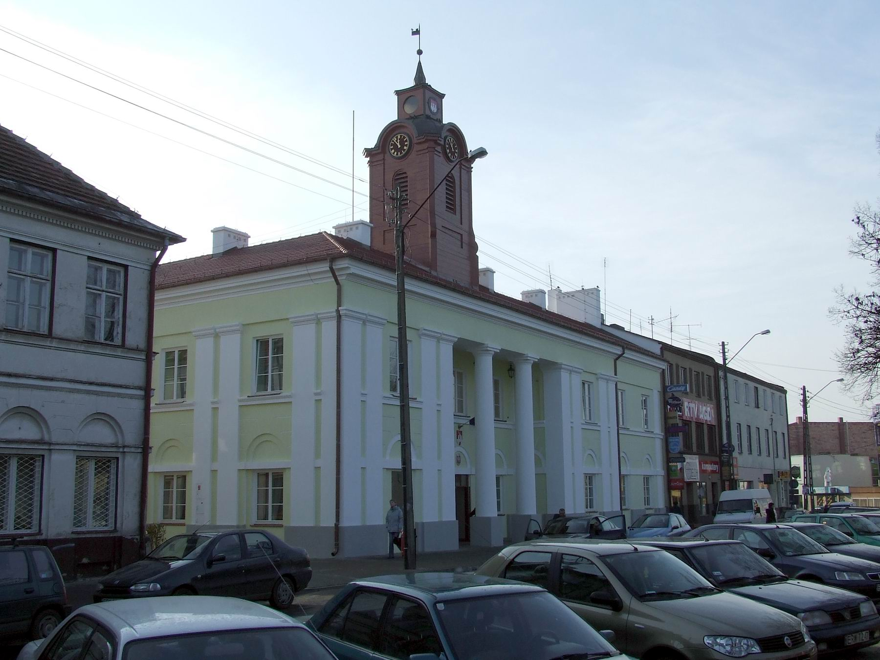 Rawa Mazowiecka, ratusz miejski na rynku (Plac Piłsudskiego)